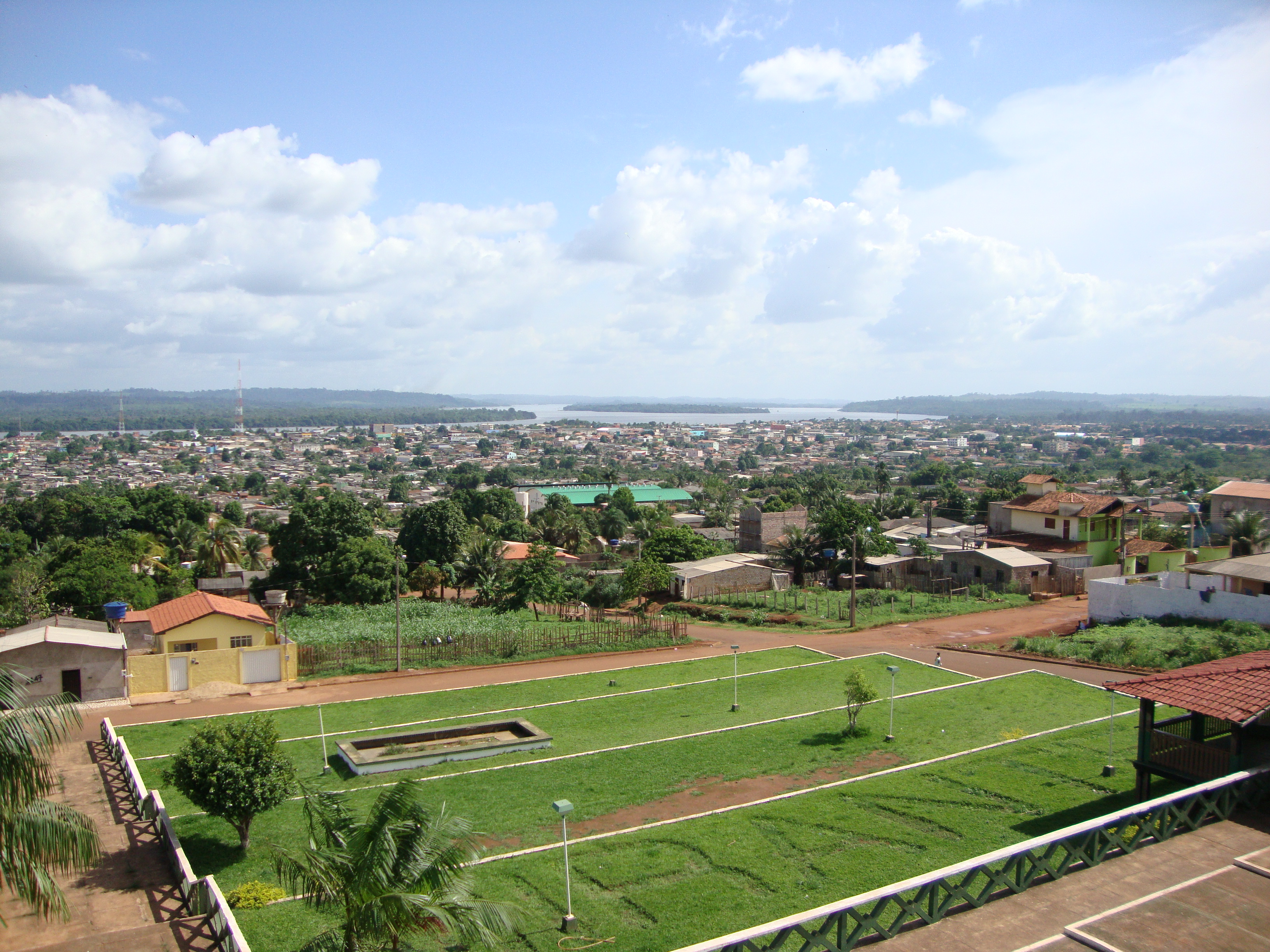 Vista do horizonte de Altamira, no Pará.